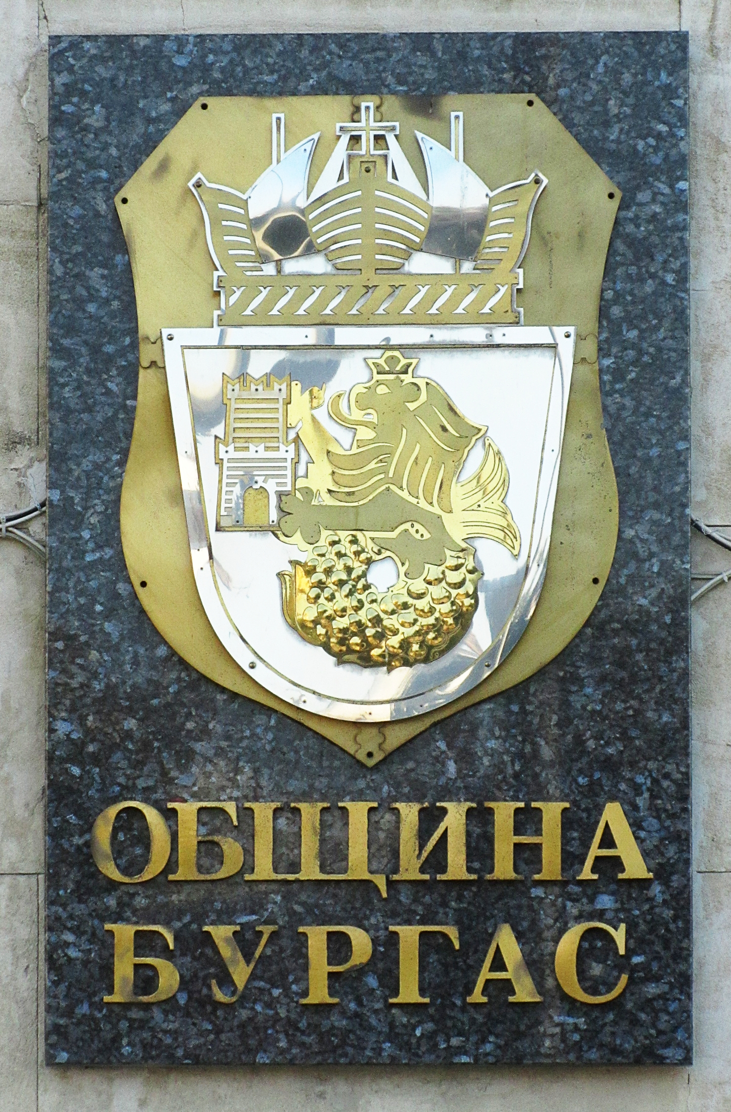 Герб на Обшина Бургас, Бургас, България